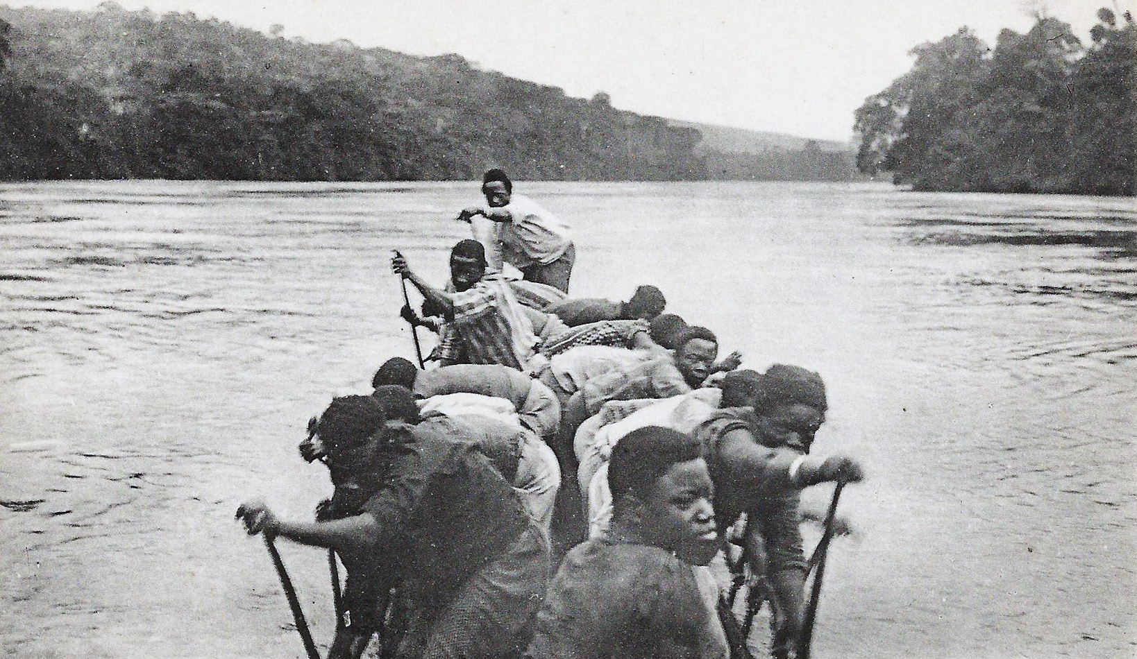 Lastoursville (Haut-Ogooué). Piroguiers Adoumas en action. [carte postale recadrée] Collection S.H.O. G.P. phot.